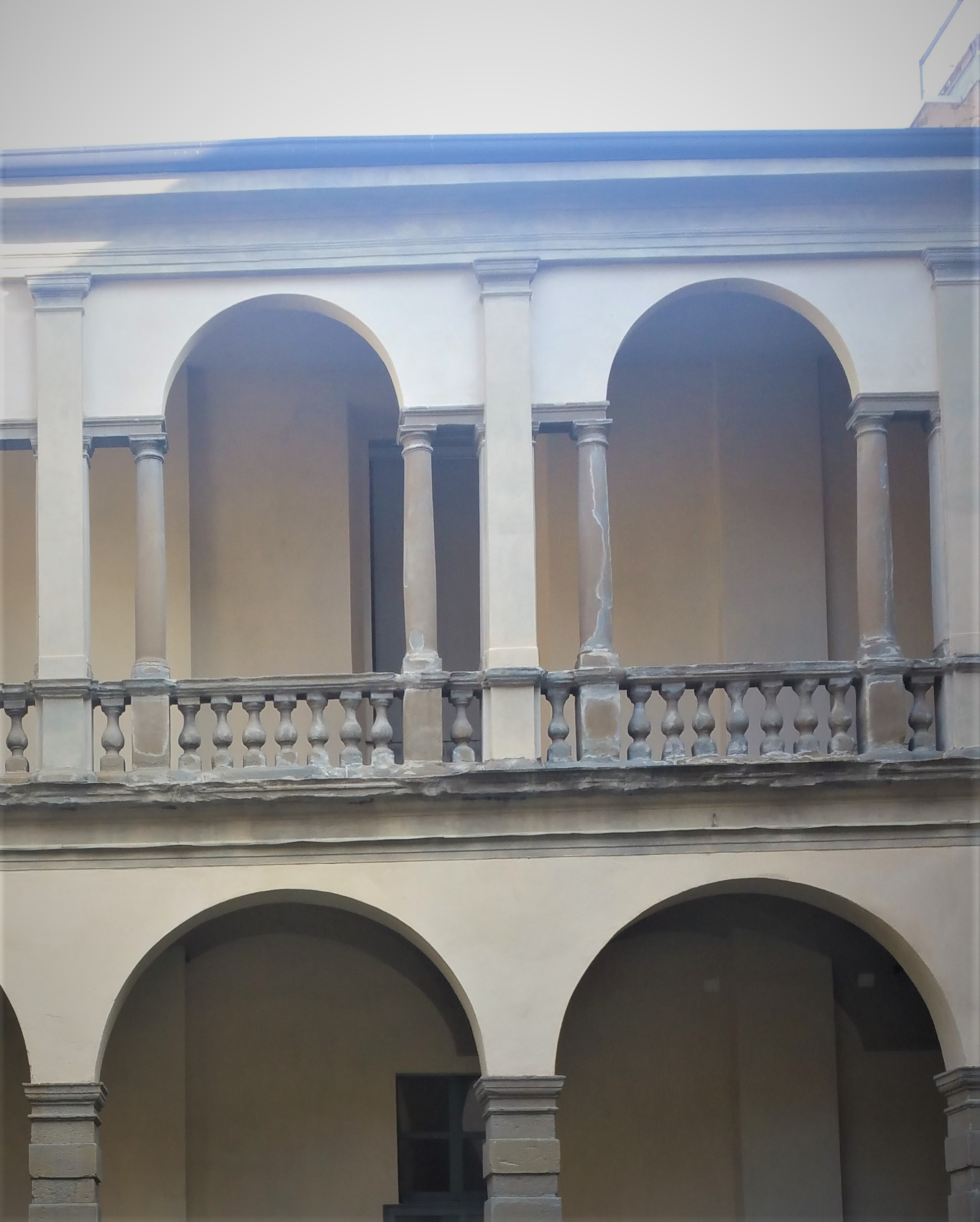 chiostro in Santa Maria Maddalena di Bergamo